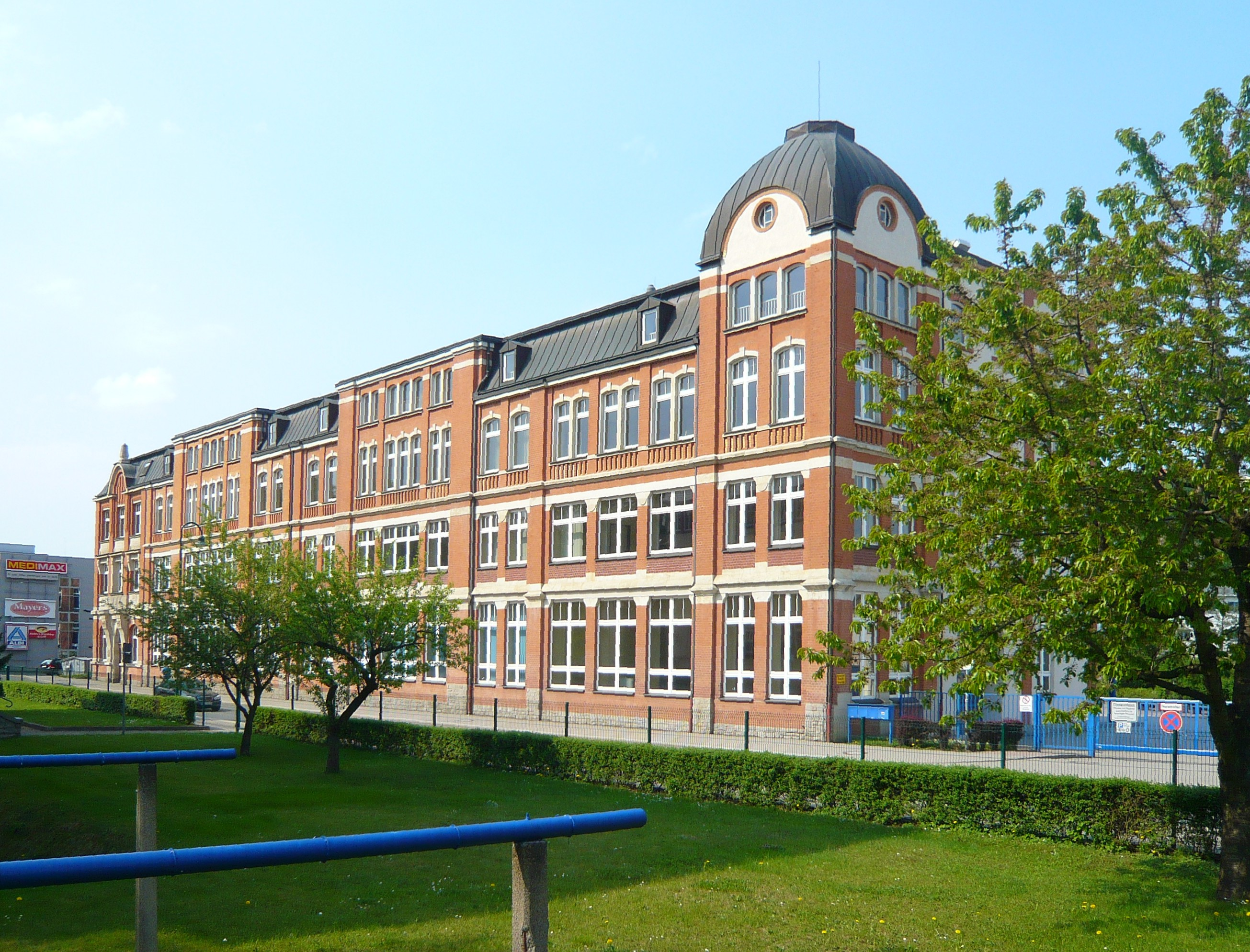 Aue, Berufliches Schulzentrum für Technik "Erdmann Kircheis"